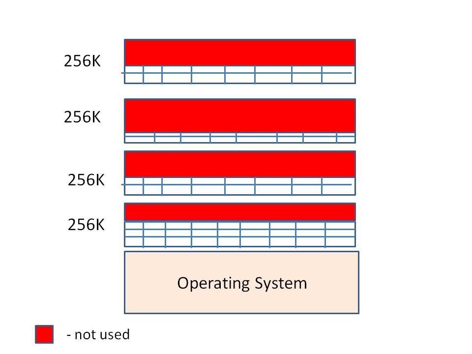 מבנה סכימטי של הזיכרון האמיתי במערכת ההפעלה MFT במחשב מיינםריים. Real Storage structure in MFT Operating System for System/360 Mainframes